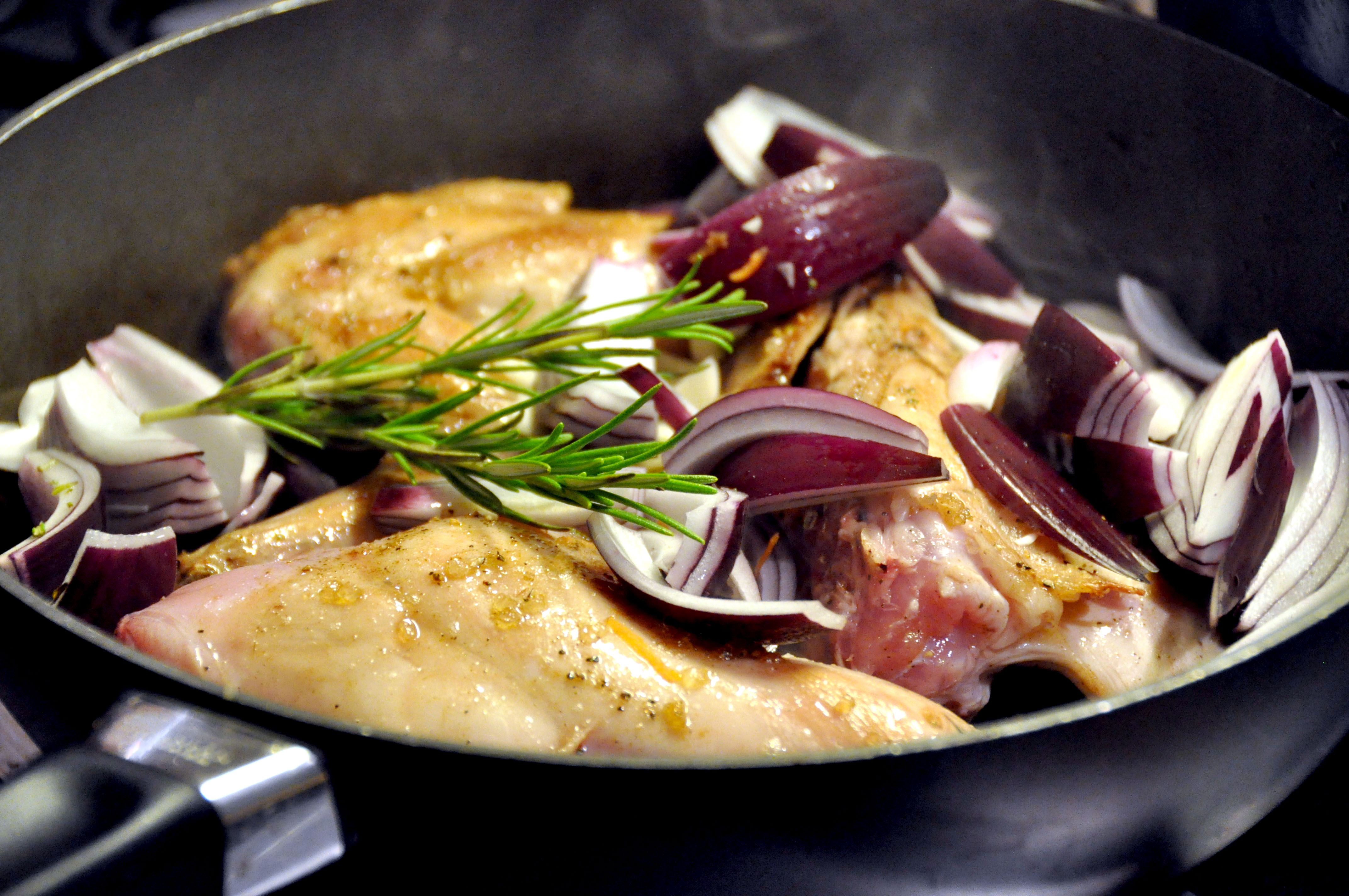 Kanin med rødløg og rosmarin